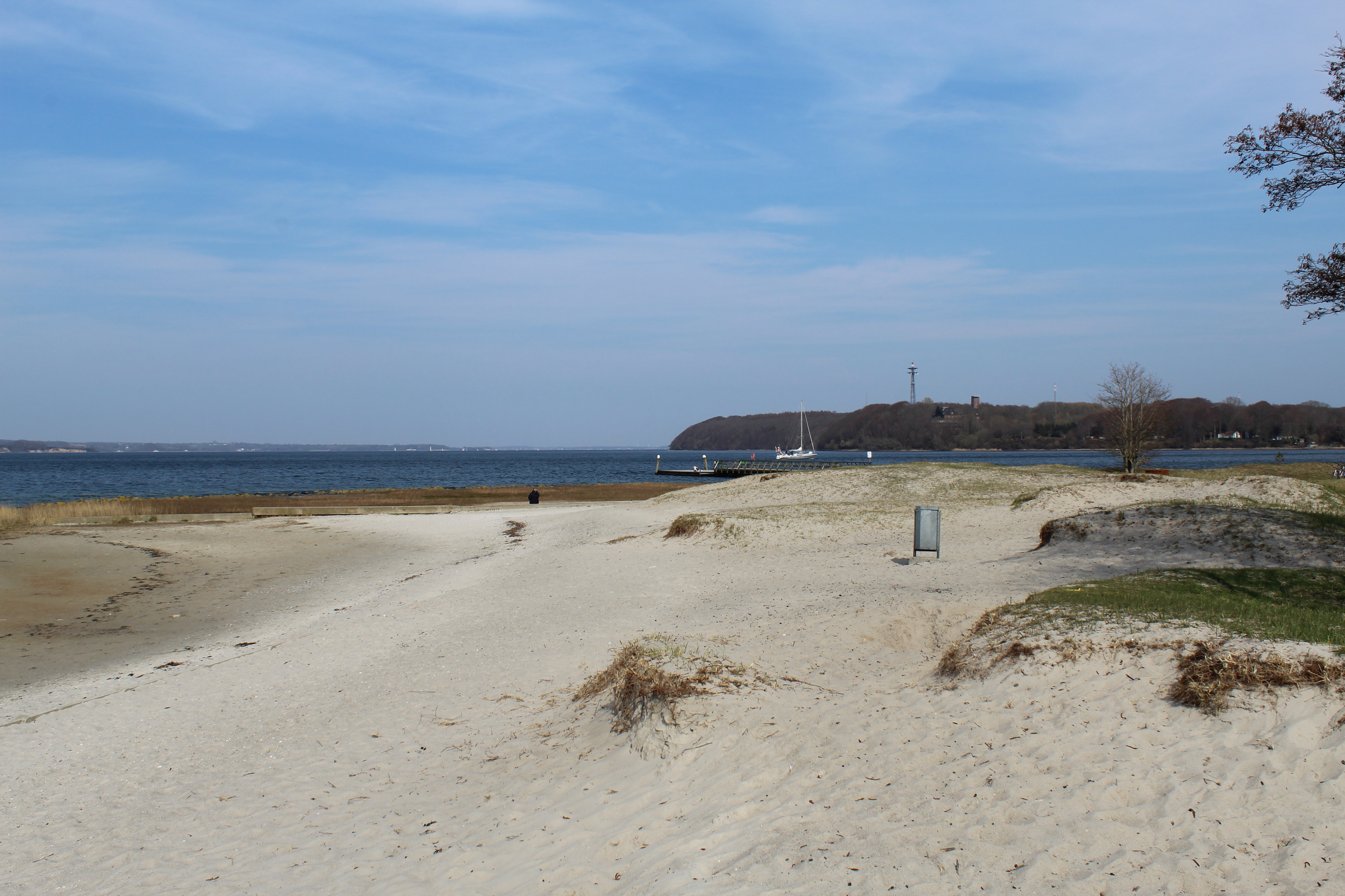 Solitüder Strand, April 2019